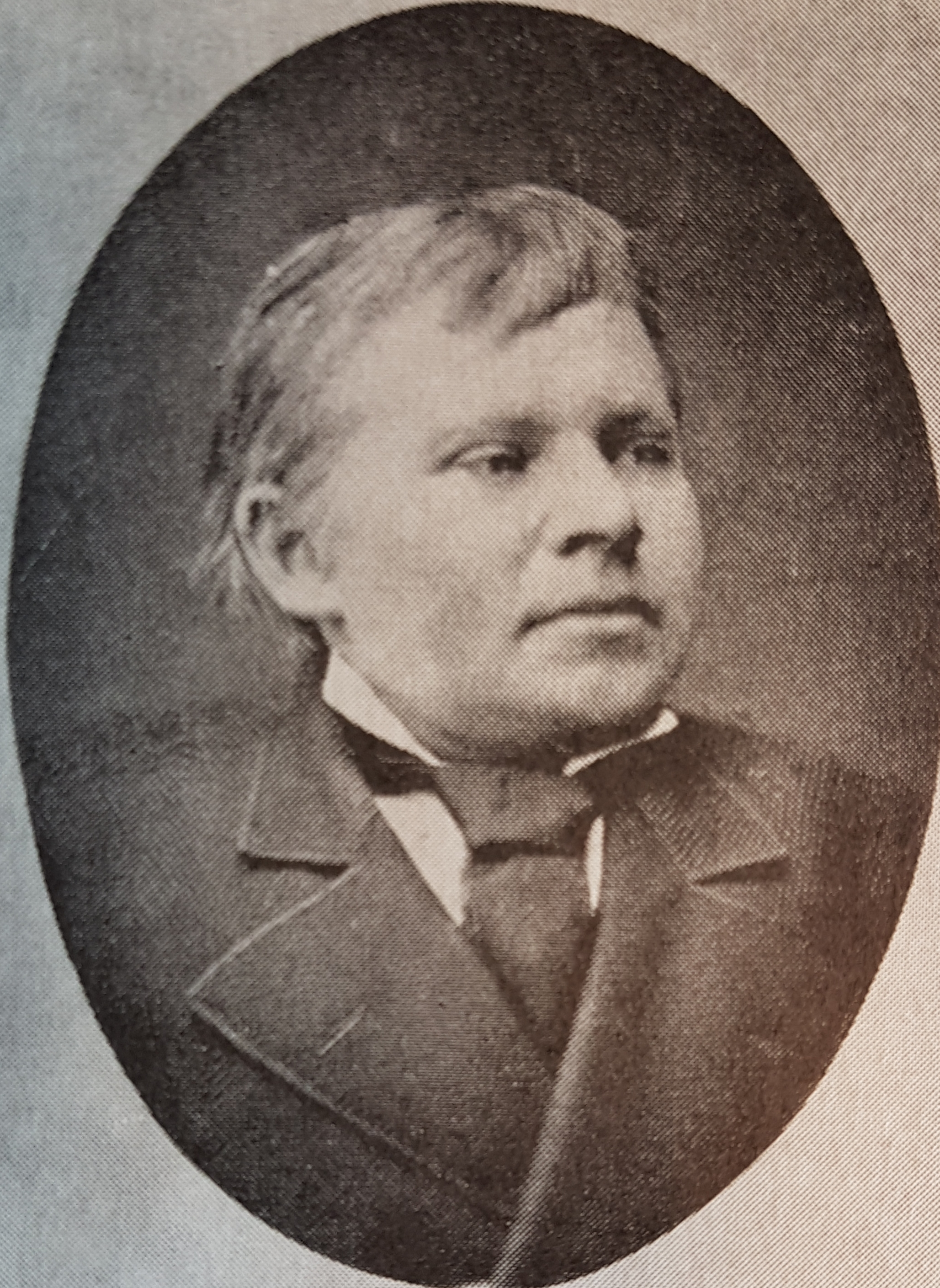 Carl Skånberg, avfotograferad porträttbild från Allhems Svenskt konstnärslexikon.